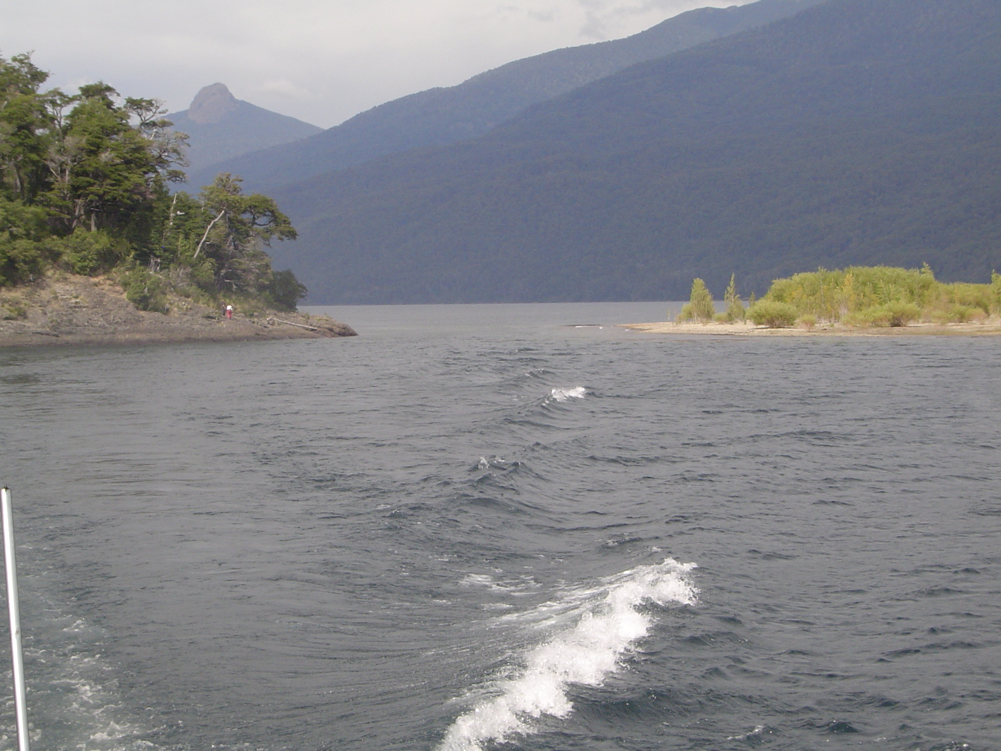 La unión de los lagos Lácar y Nonthué. Marzo de 2007.